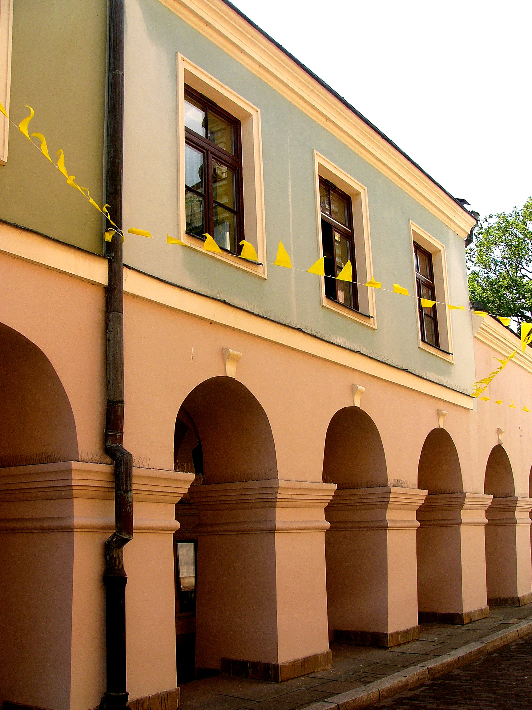 Zamość, Kamienica (XVI/XVII w., XVIII w., XX w.)